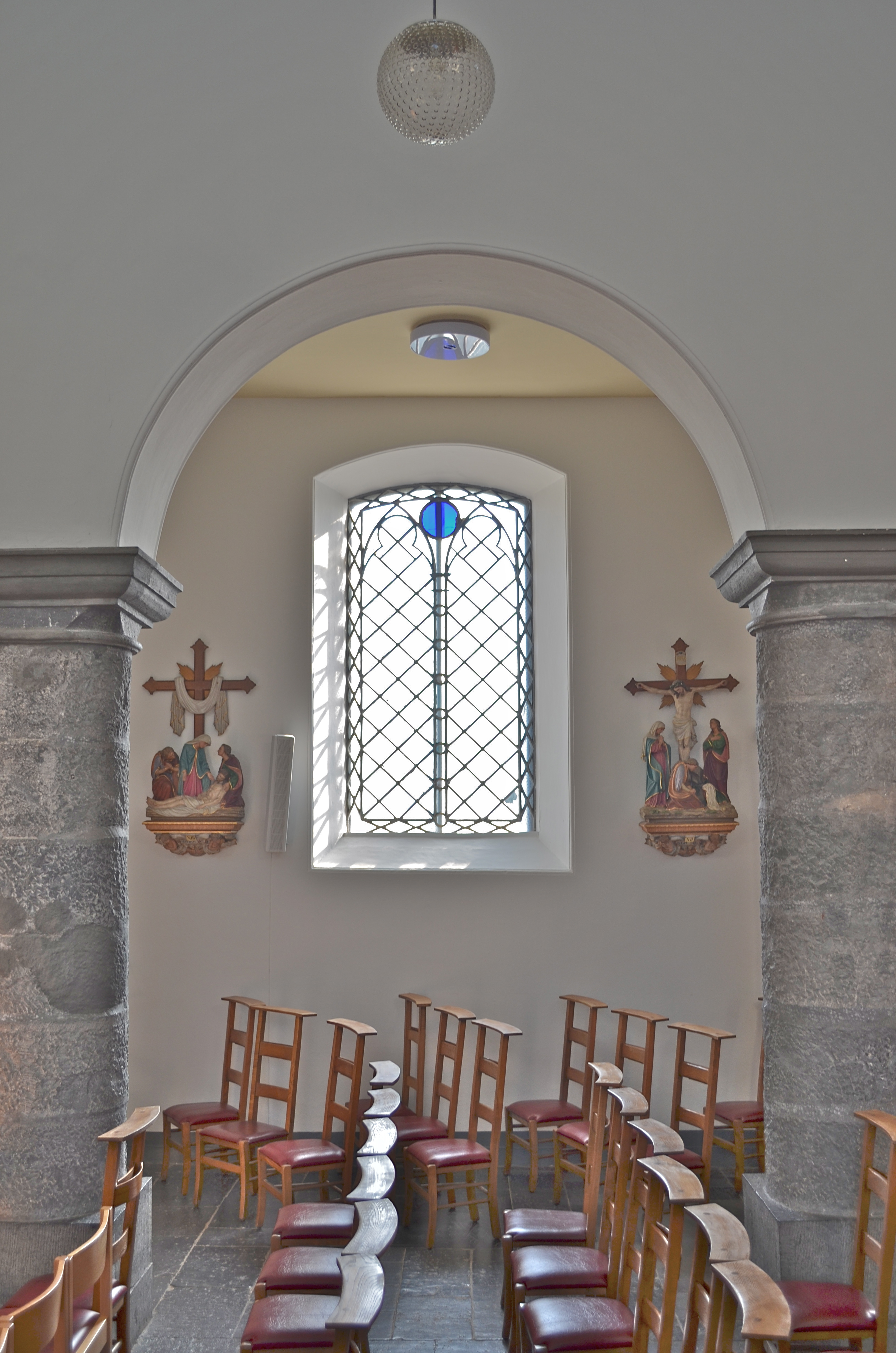 Travée.